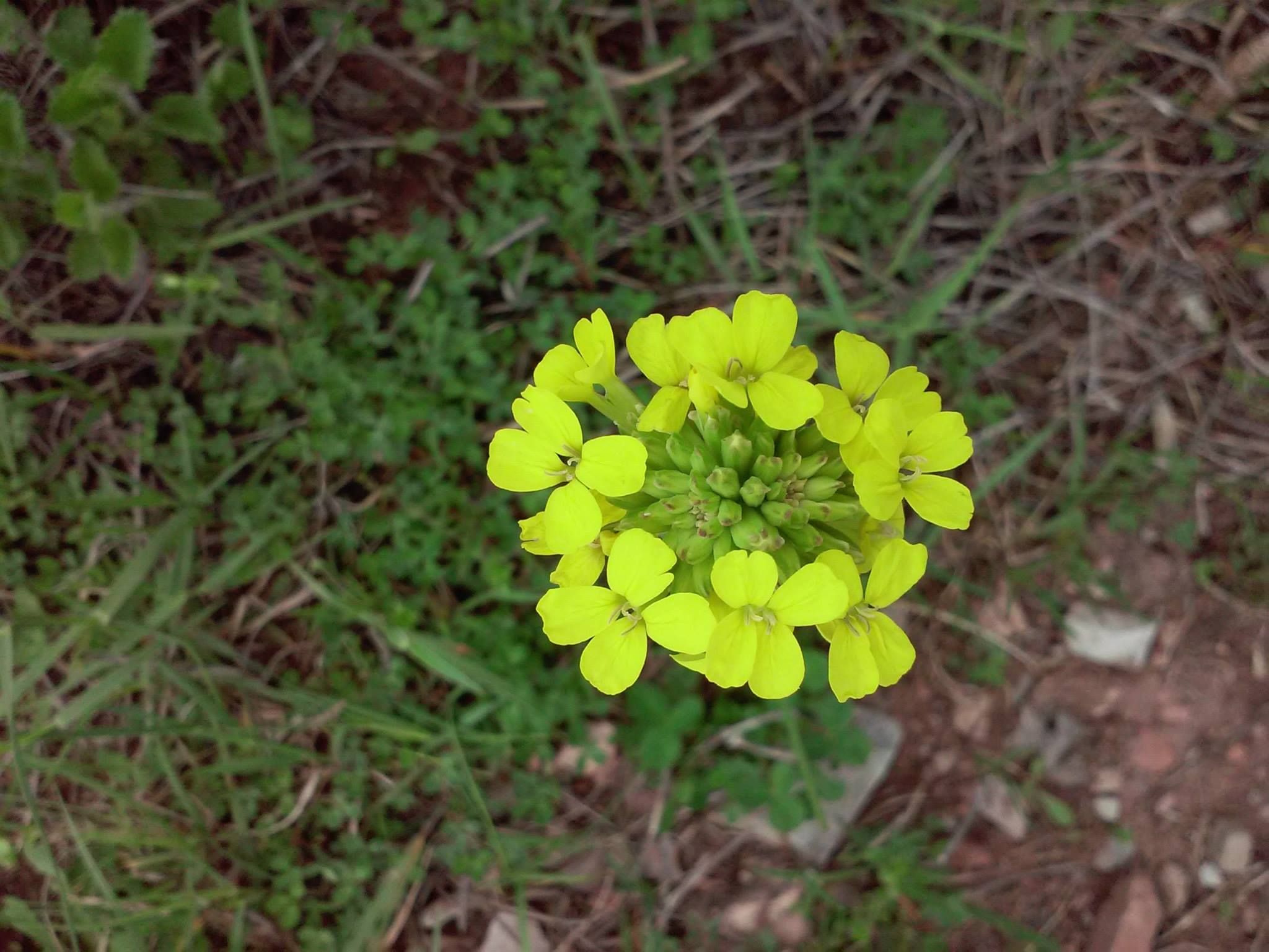 Latınca adı Sisymbrium loeseliidir. Gövdəsi budaqlanan, sıx yarpaq və tükcüklərlə əhatə olunmuş ikillik ot bitkisidir. Yarpaqları qayıqvari – lələkvari daraq şəklindədir. Ləçəkləri sarımtıldır. Qını 2 – 3 sm uzunluğunda düz, azca əyilən haldadır. Toxumları ellipsvari açıq sarımtıl rəngdədir. Lezel şüvərəninə demək olar ki, Azərbaycanın bütün ərazilərində rast gəlmək olar. Buna düzənlikdən tutmuş dağlıq zonalarına qədər sahələrdə təsadüf etmək olar.